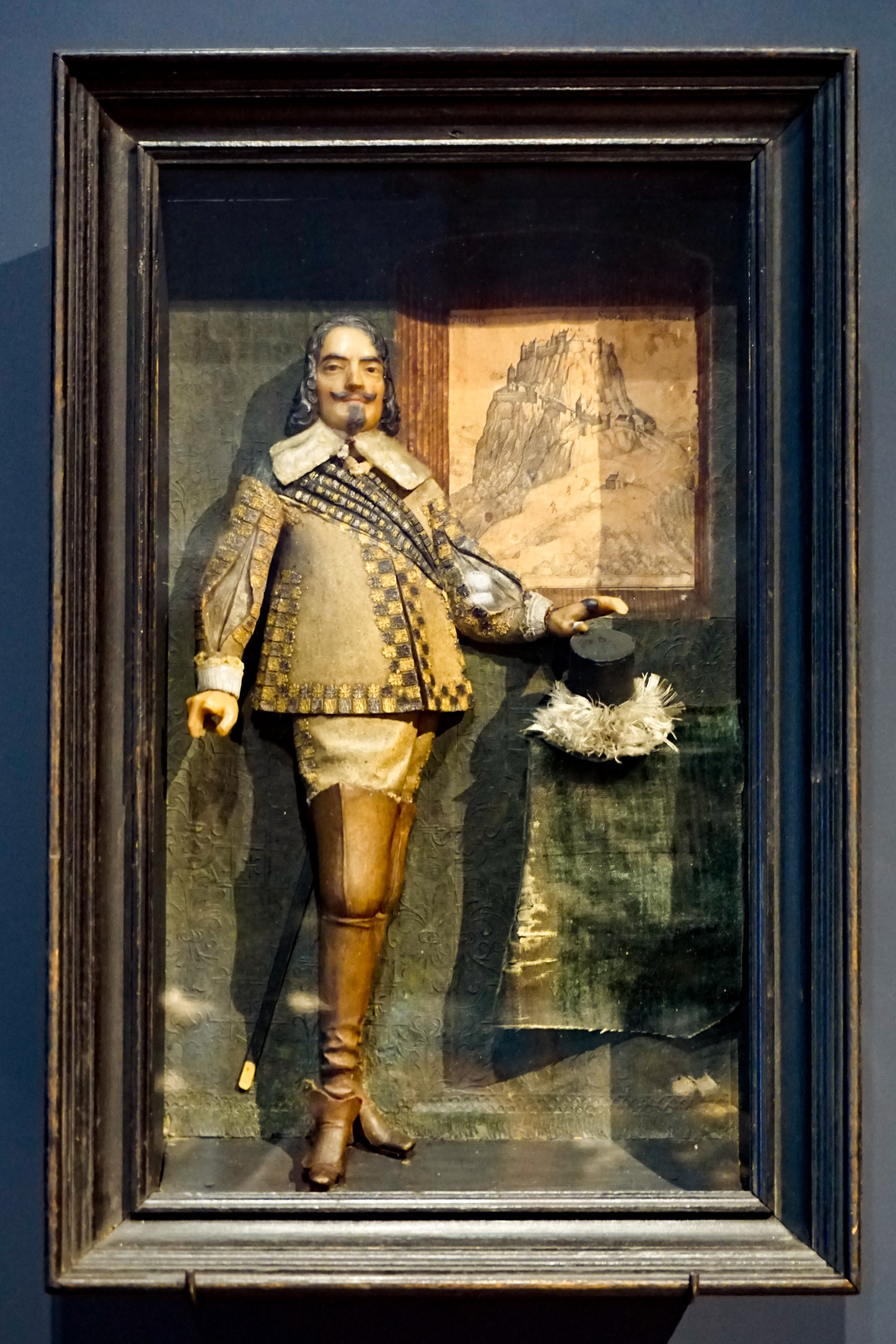 Kunstkammer im Landesmuseum Württemberg: Conrad Widerholt, Wachsbossierung, zweite Hälfte 17. Jahrhundert